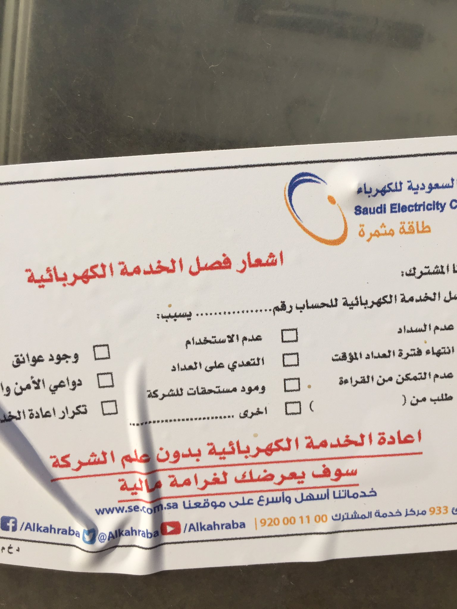 اشعار فصل الخدمة شركة الكهرباء السعودية